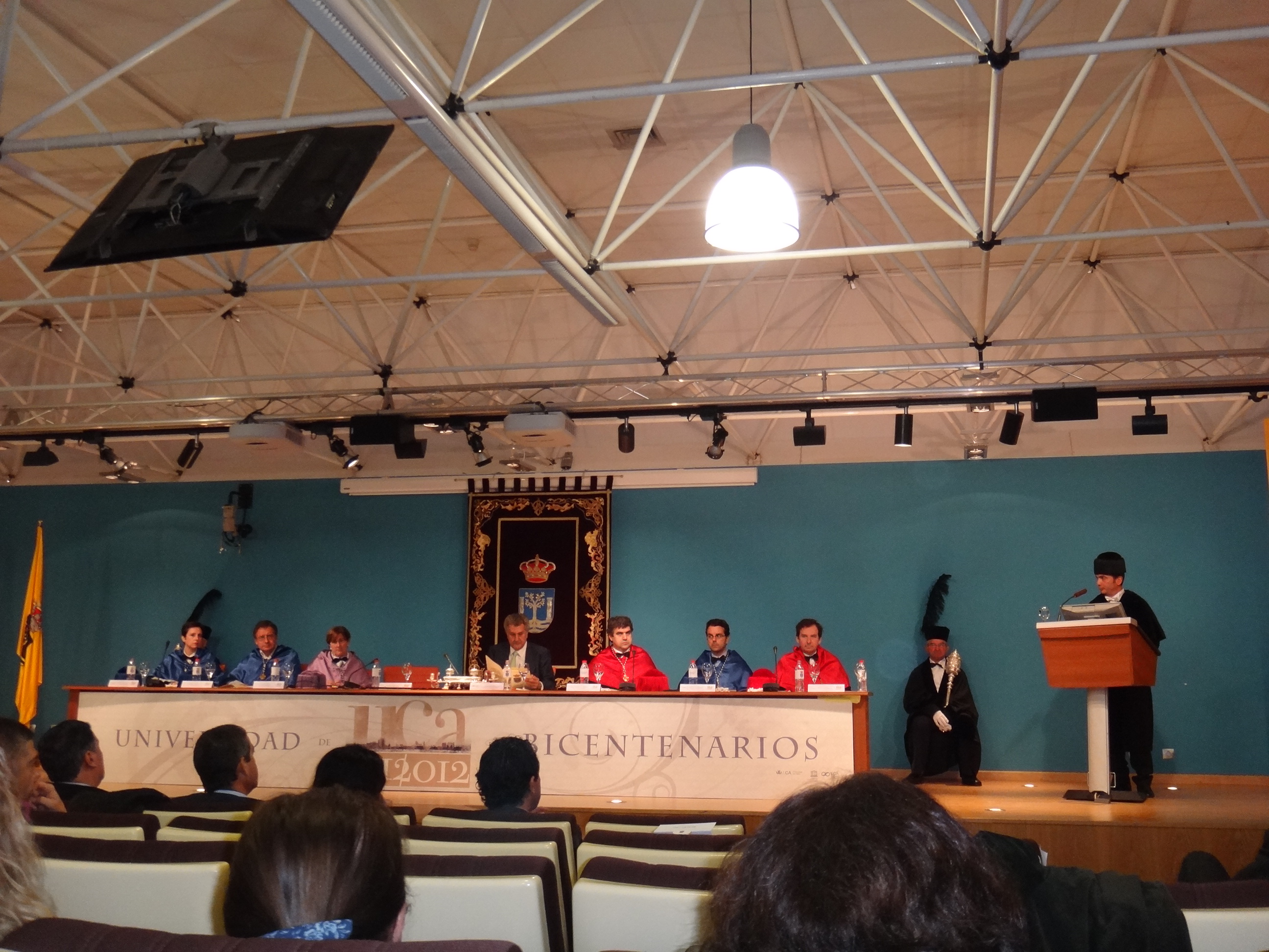 Eduardo González Mazo se dirige al Claustro Extraordinario de la Universidad de Cádiz en el acto de Investidura de nuevos Doctores